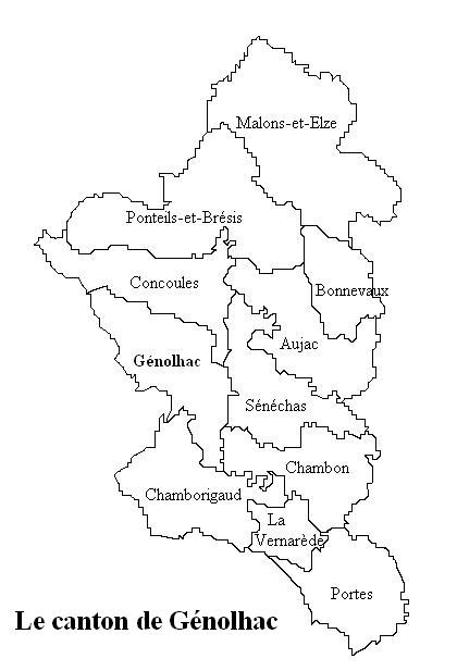 Le canton de Génolhac Image personnelle